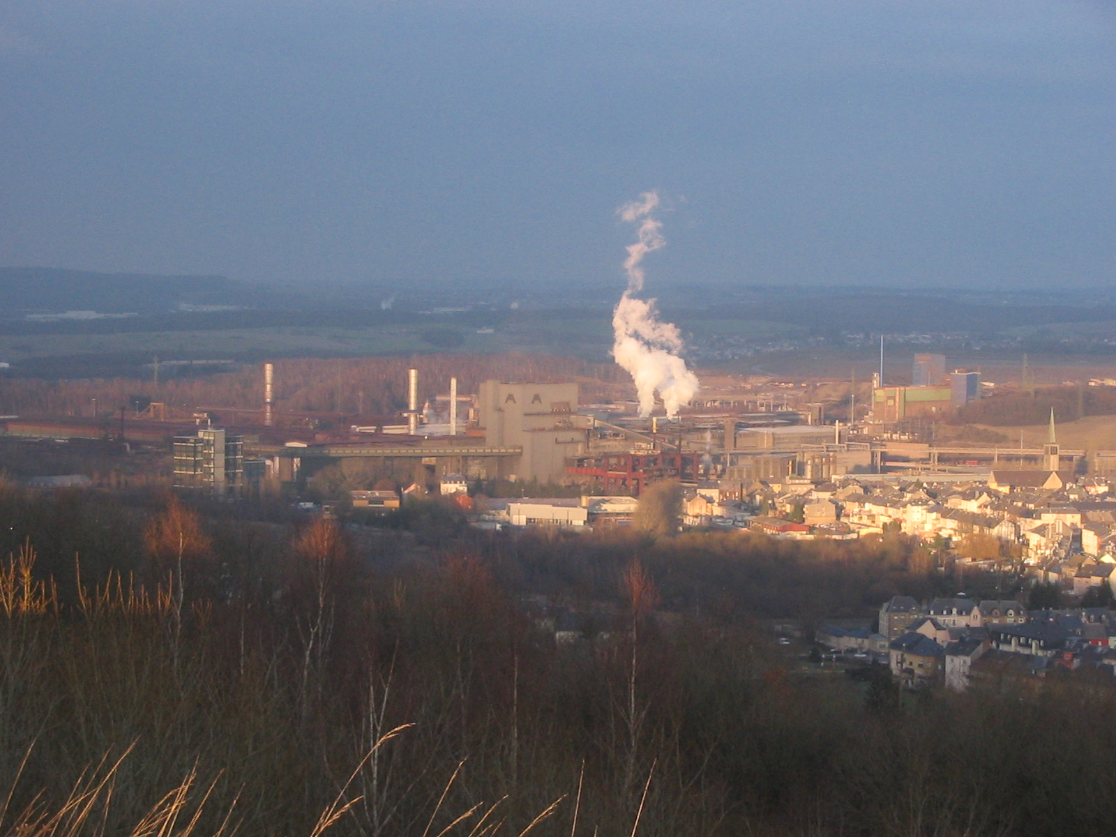 Blick auf das Stahlwerk von oben, Differdingen, Luxemburg.